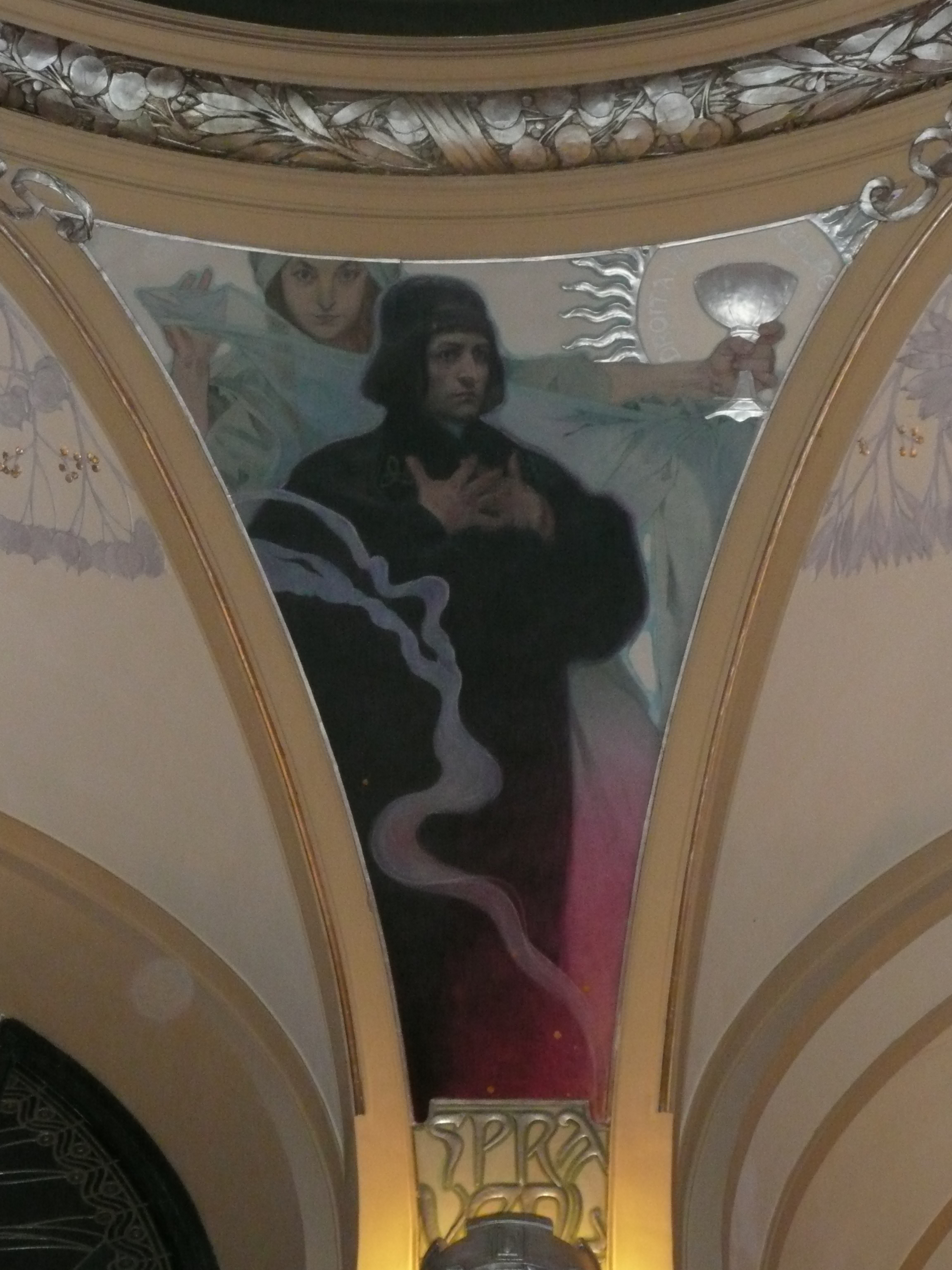 Picture Jan Hus by Alphonse Mucha